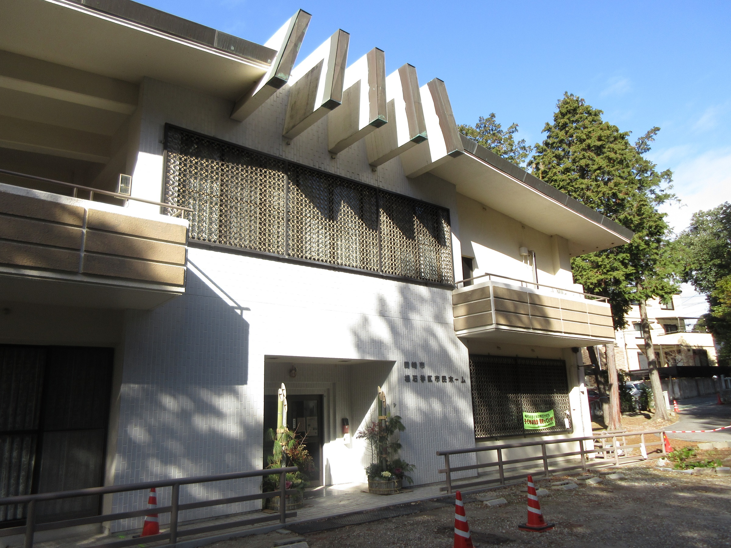 根石学区市民ホーム（岡崎市元欠町）